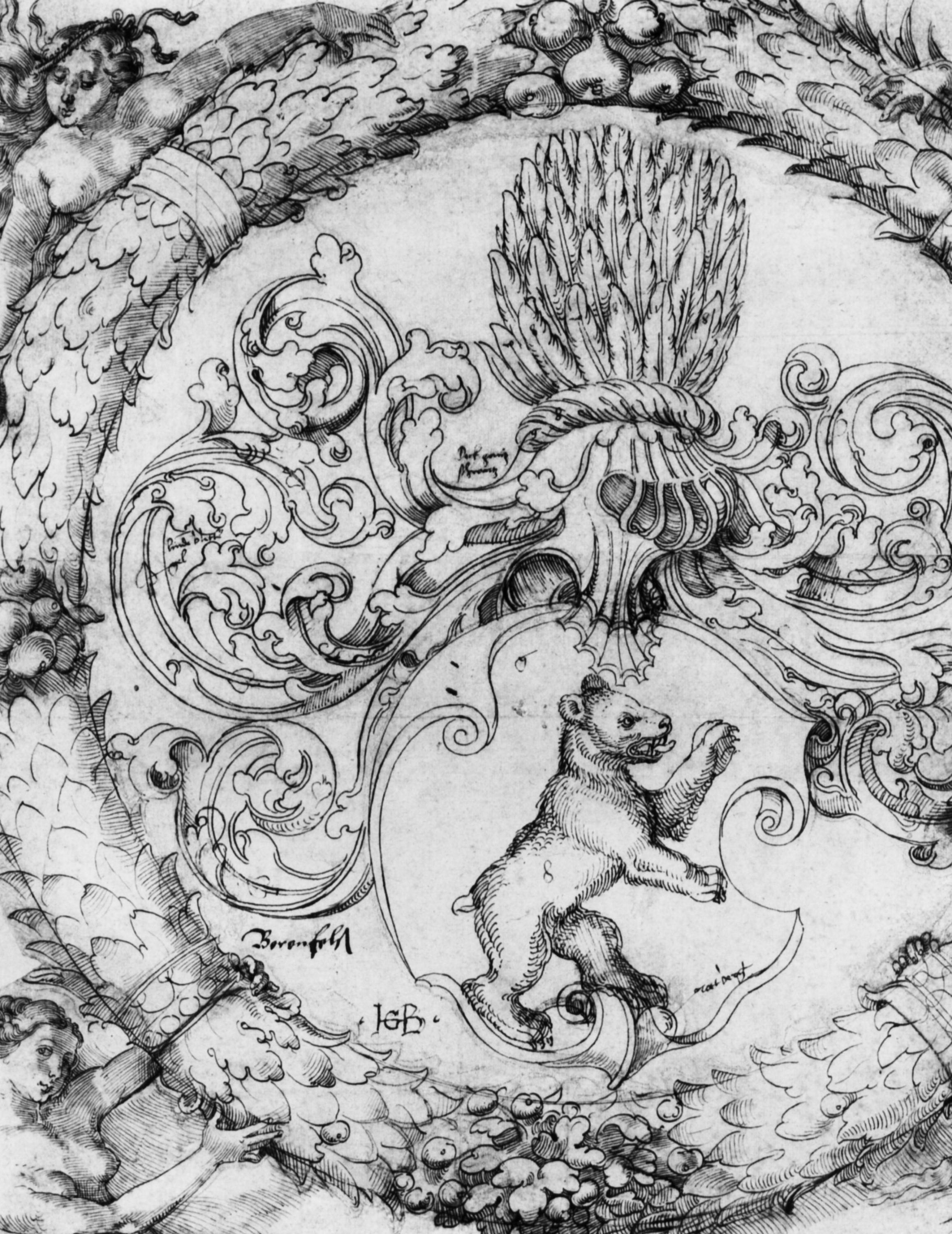 Wappen des Baslers Adelberg III. von Bärenfels, Herrn zu Arisdorf etc.